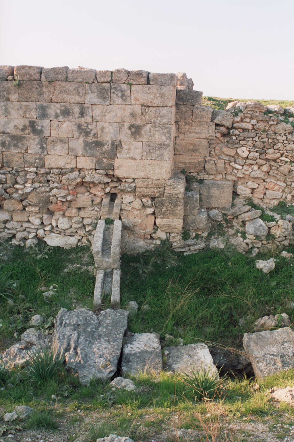 Viaggio in Siria 2005